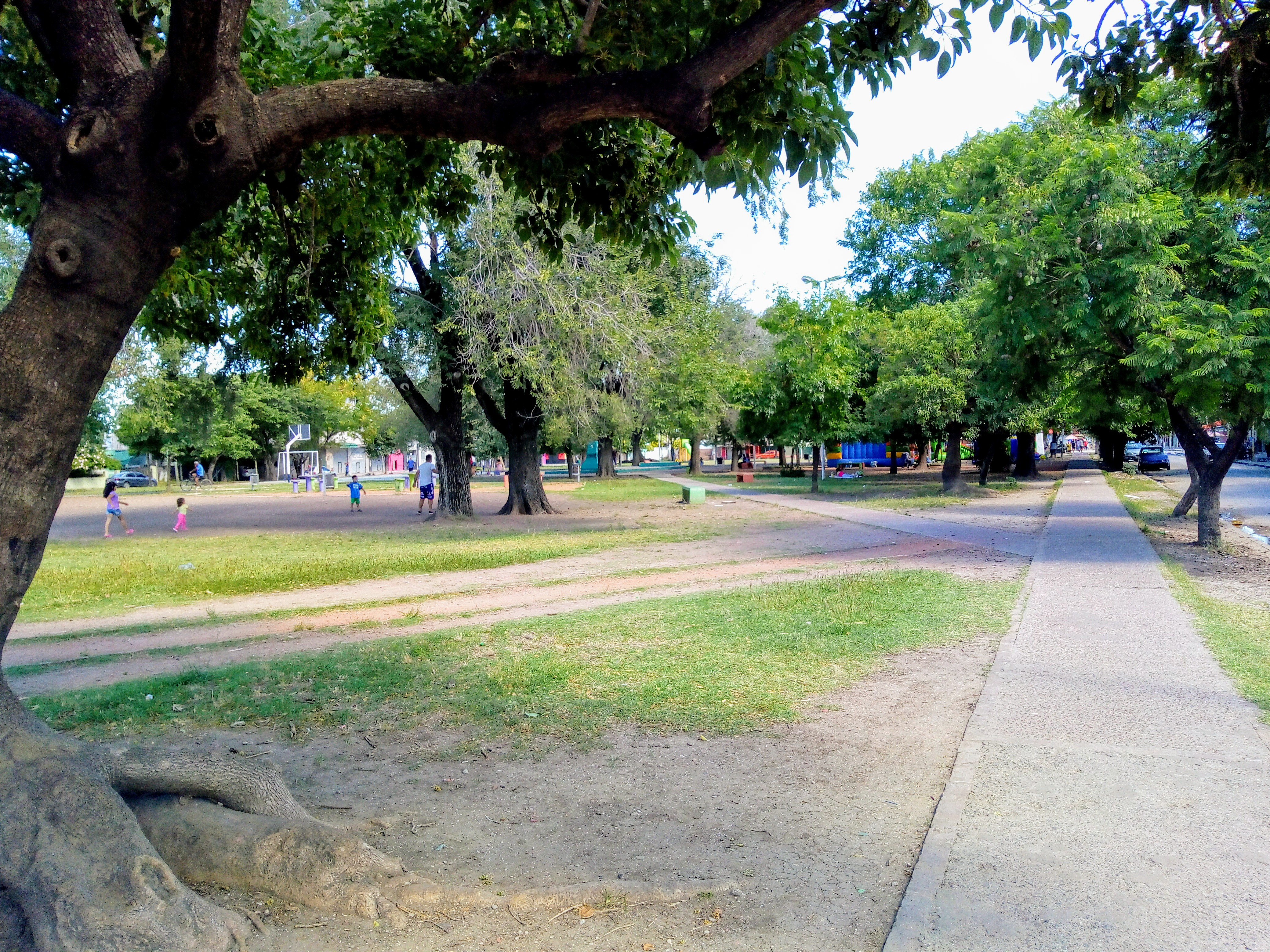 Plaza Manuel Belgrano Gobernador A Costa